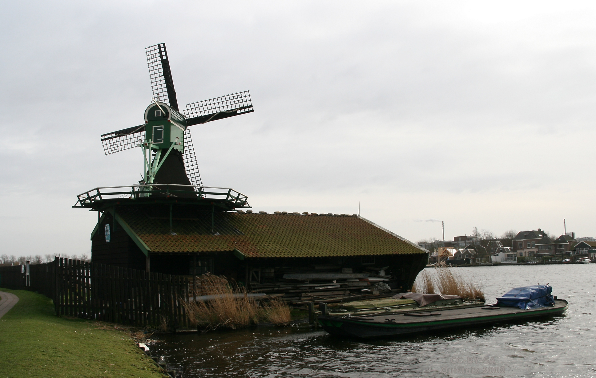 Zaanse Schans: Molen Het Klaverblad